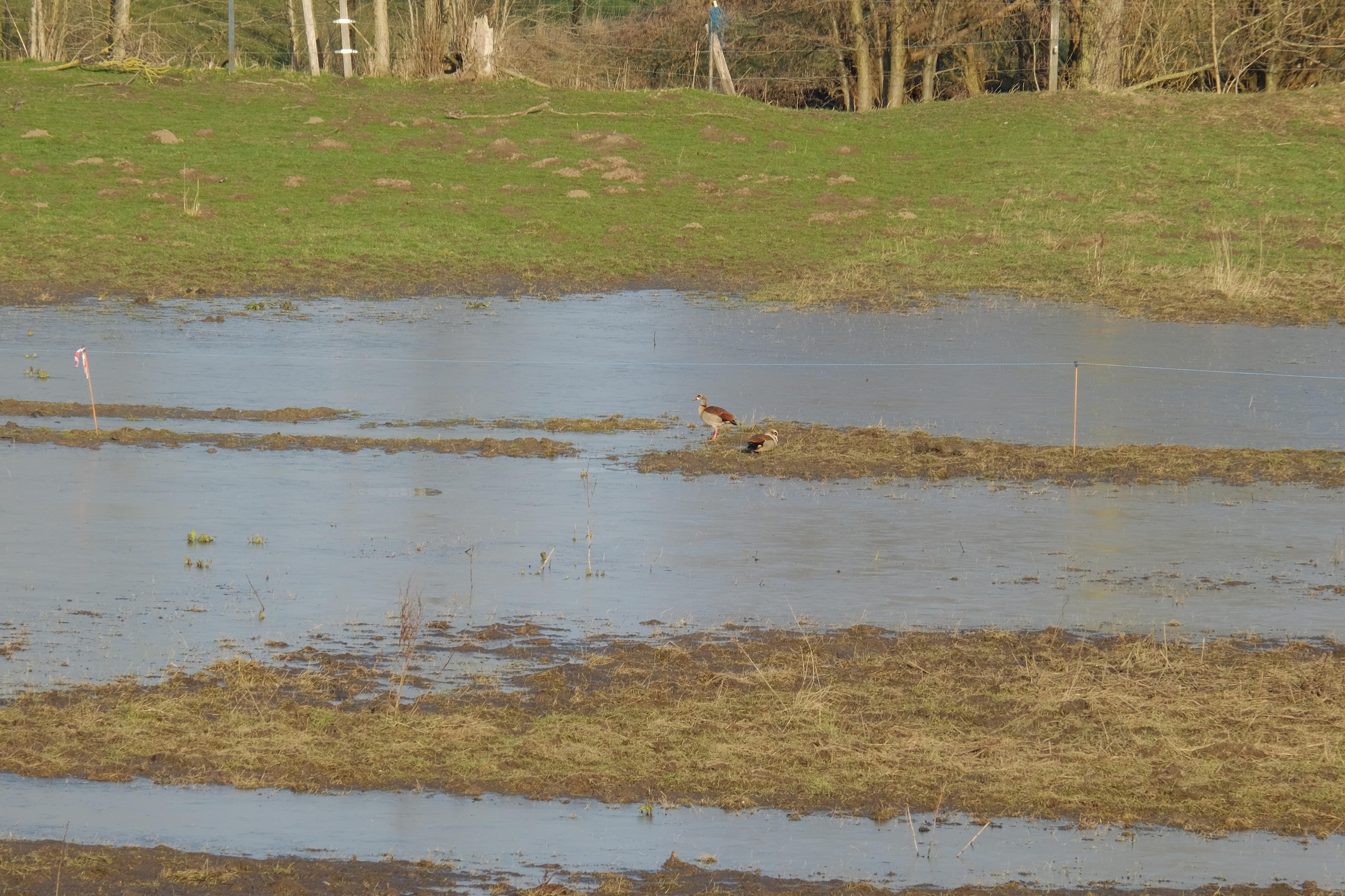 Couple photographié dans le Hainaut, en Belgique.